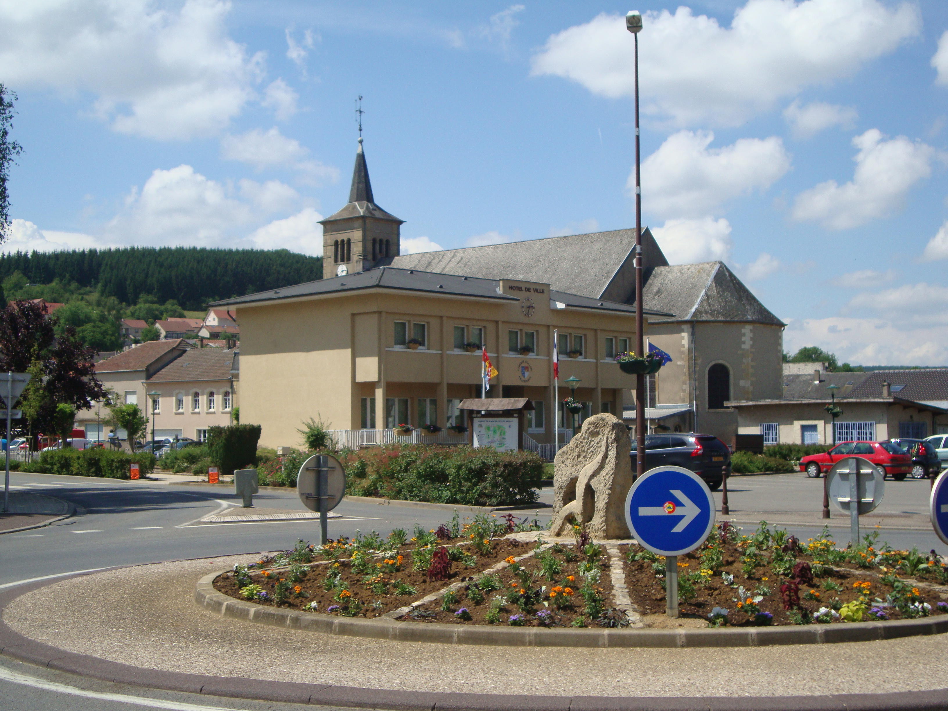 Volmerange-lès-Mines, Moselle (57)